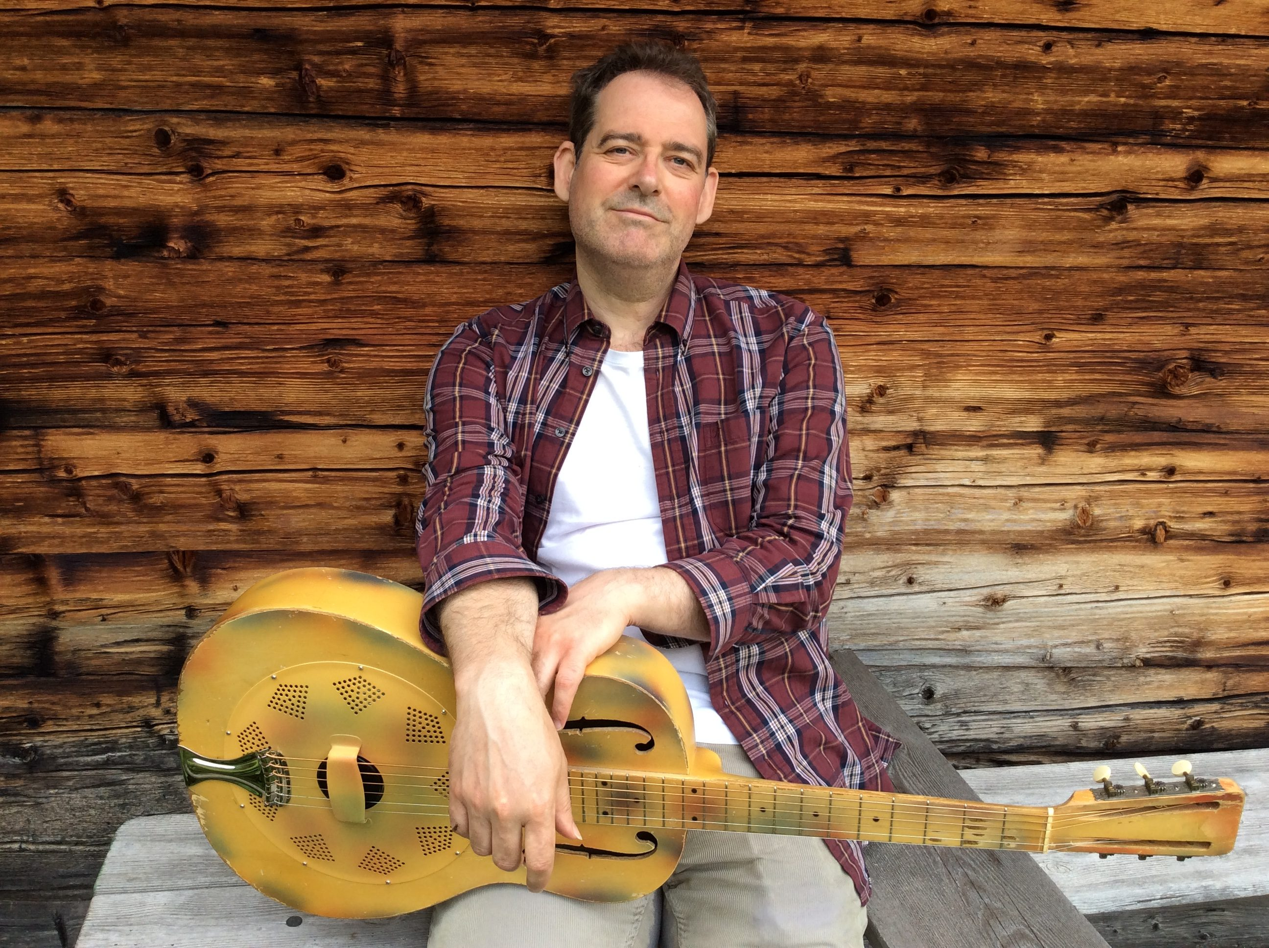 Gottfried David Gfrerer mit seiner Resonatorgitarre auf der Alm in den Kärntner Nockbergen.